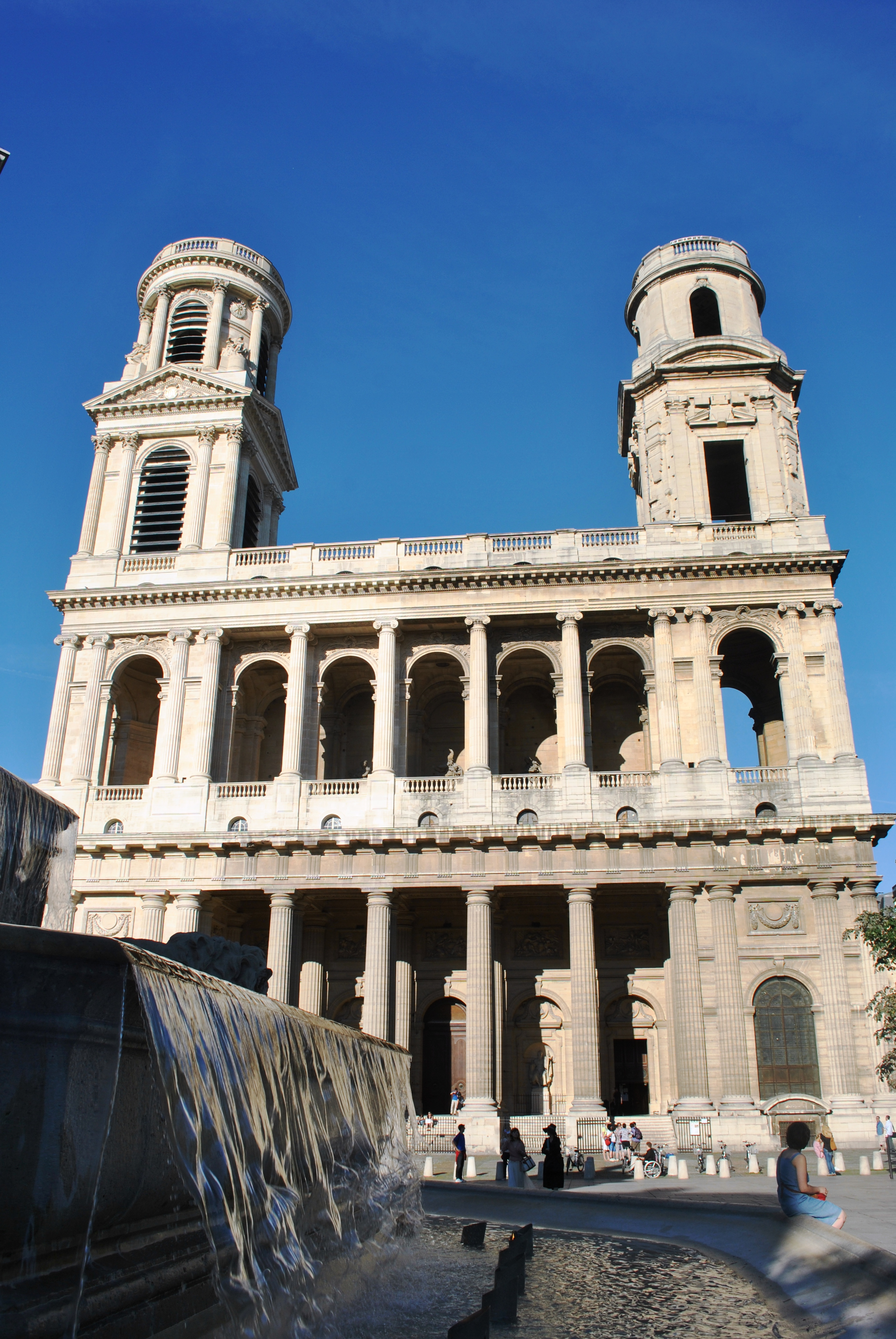 Église Saint-Sulpice (Classé) .